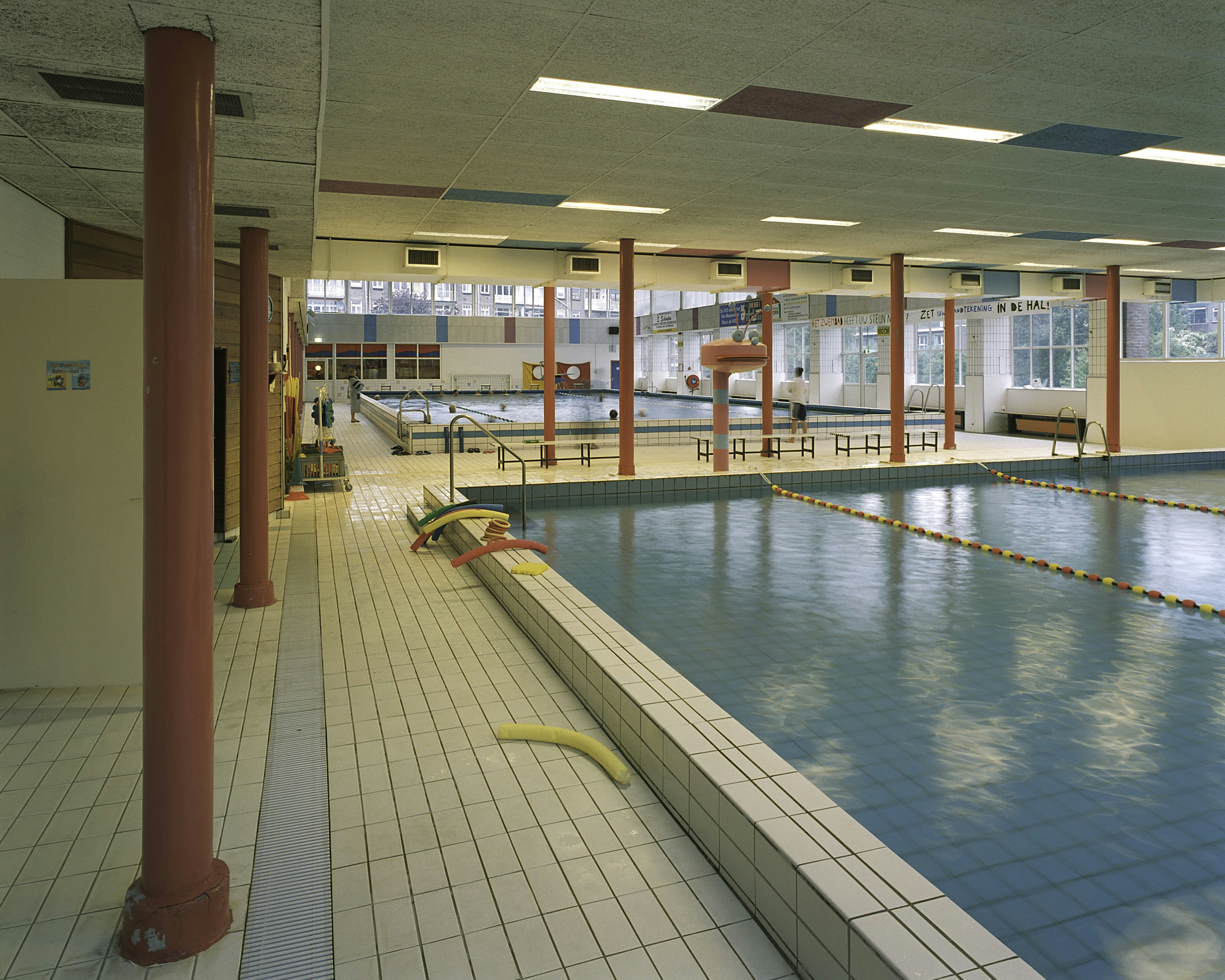 Sportfondsenbad Rotterdam Noord: Interieur, overzicht zwemhal met binnenbad